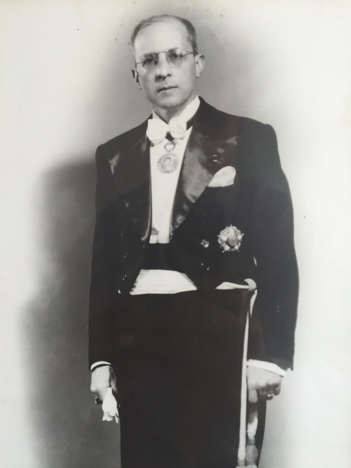 Manuel Belisario Llosa Arguelles, Ministro de Hacienda, 1948